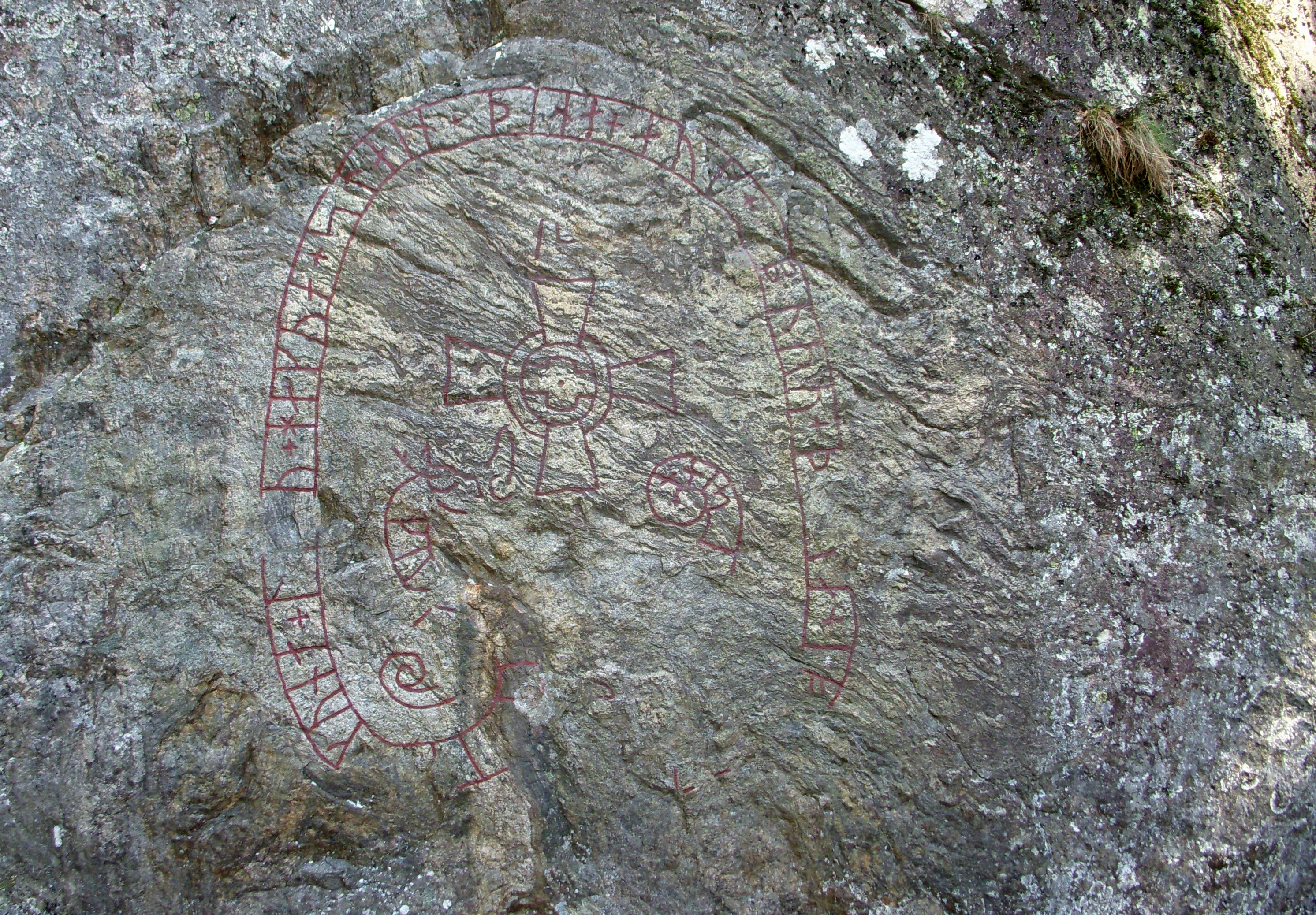 Runhäll vid Dalarövägen (RAÄ 498:1)